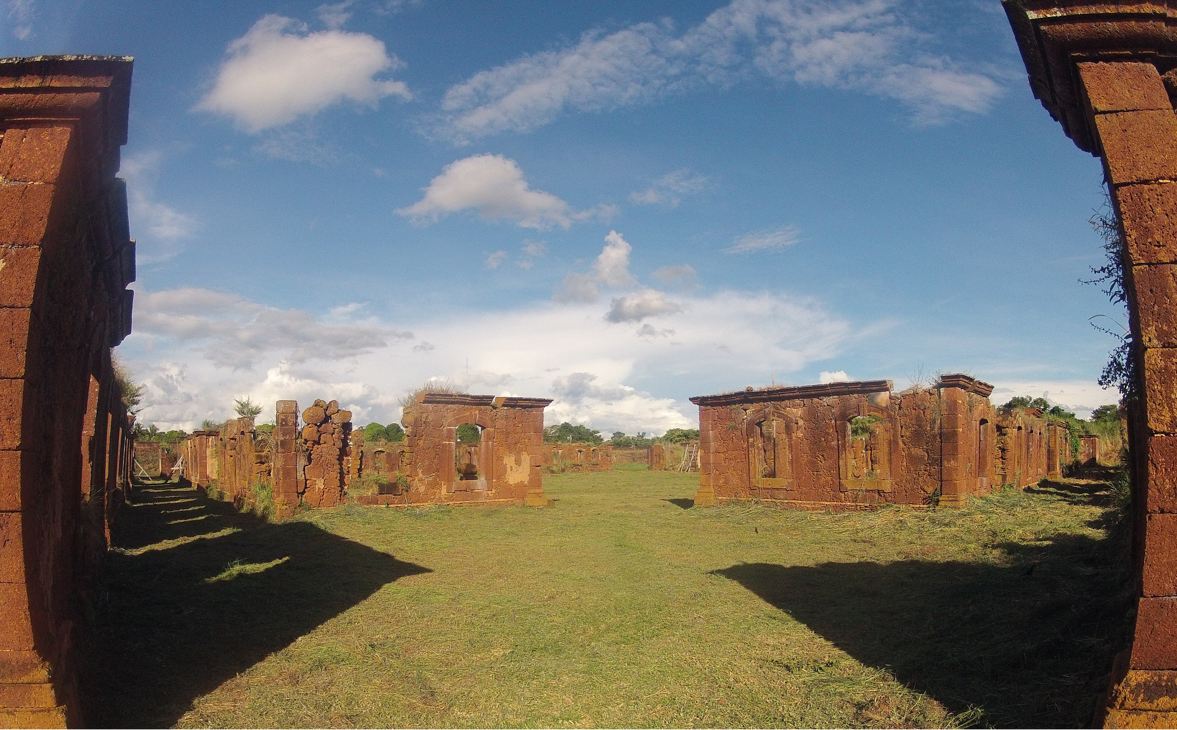 Forte Príncipe da Beira - Ruinas